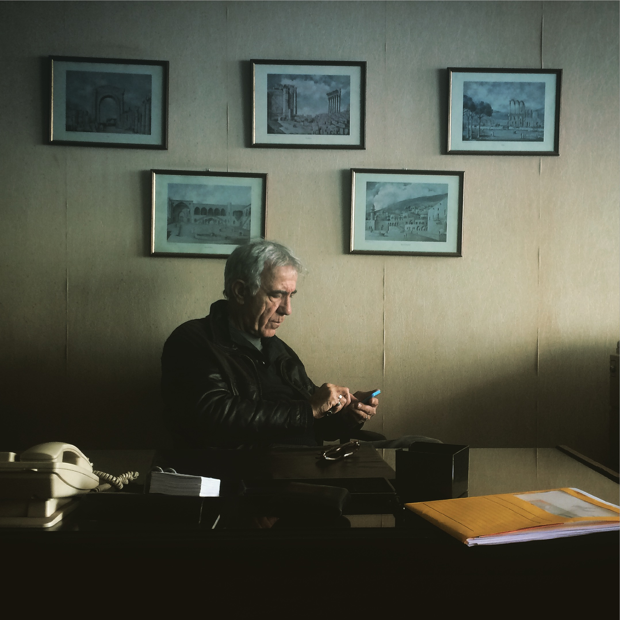 Michel Zendali